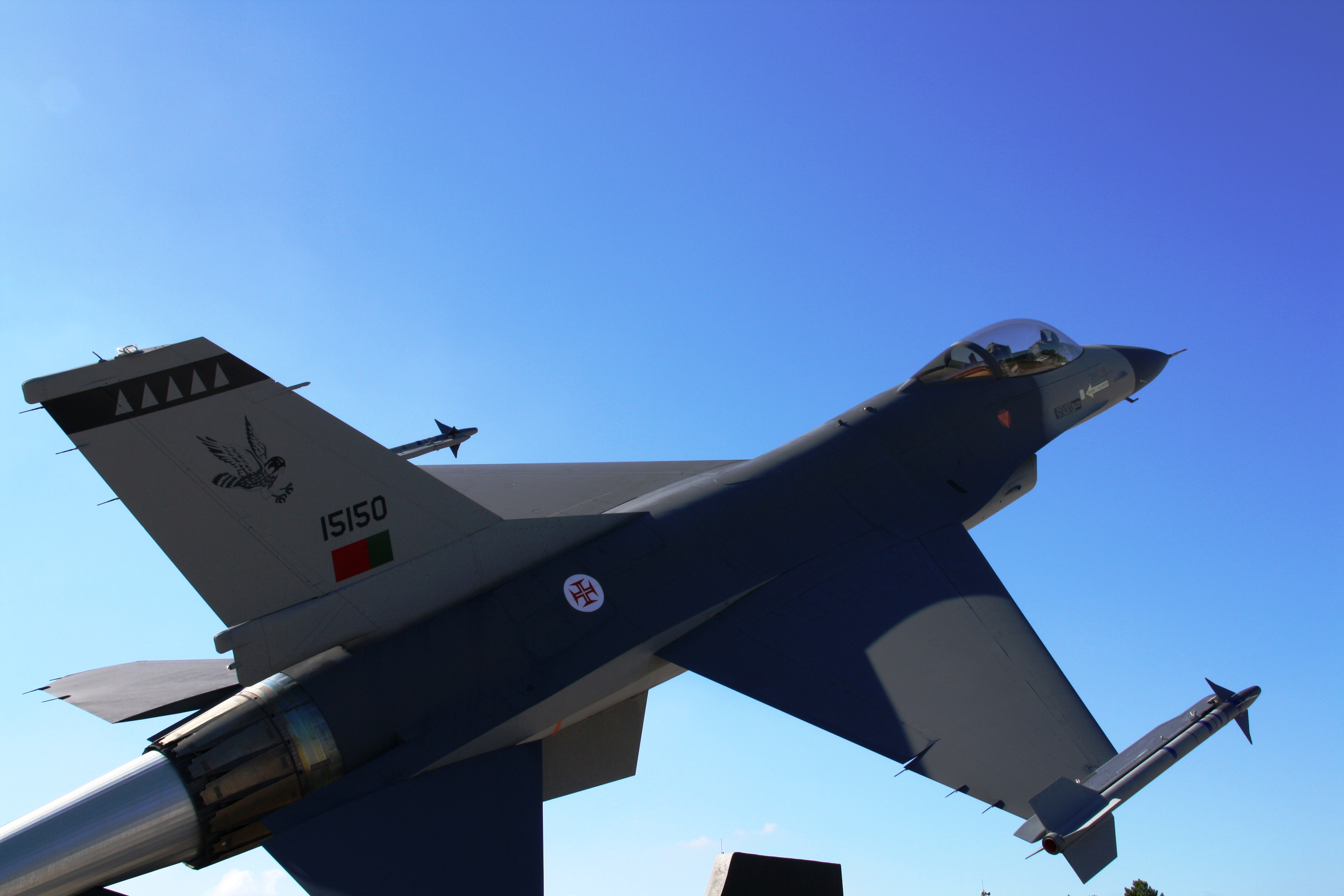 F16 monument at Monte Real.